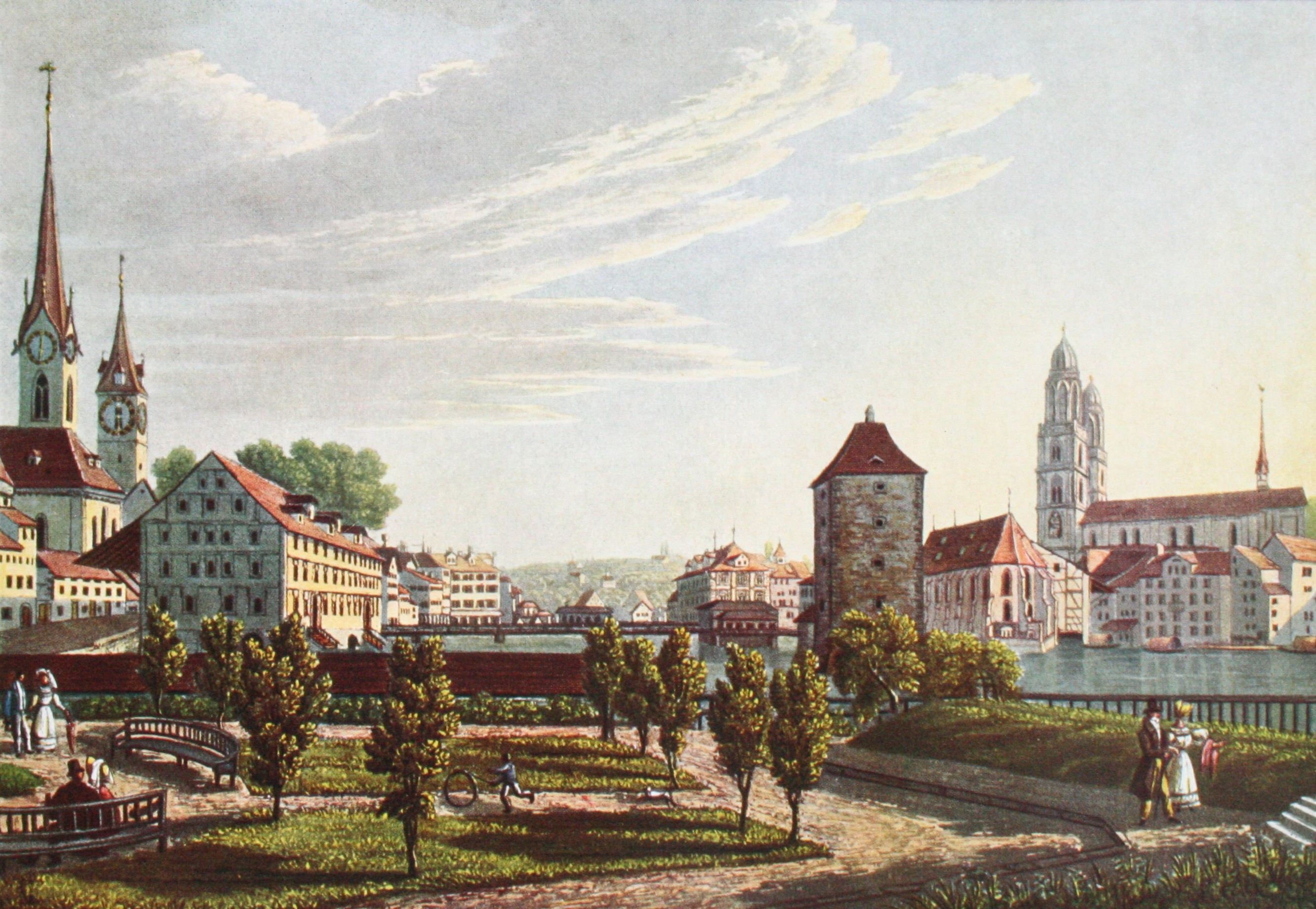 oberer :de:Bauschänzli kolorierter Stich von Arter /Suter um 1830